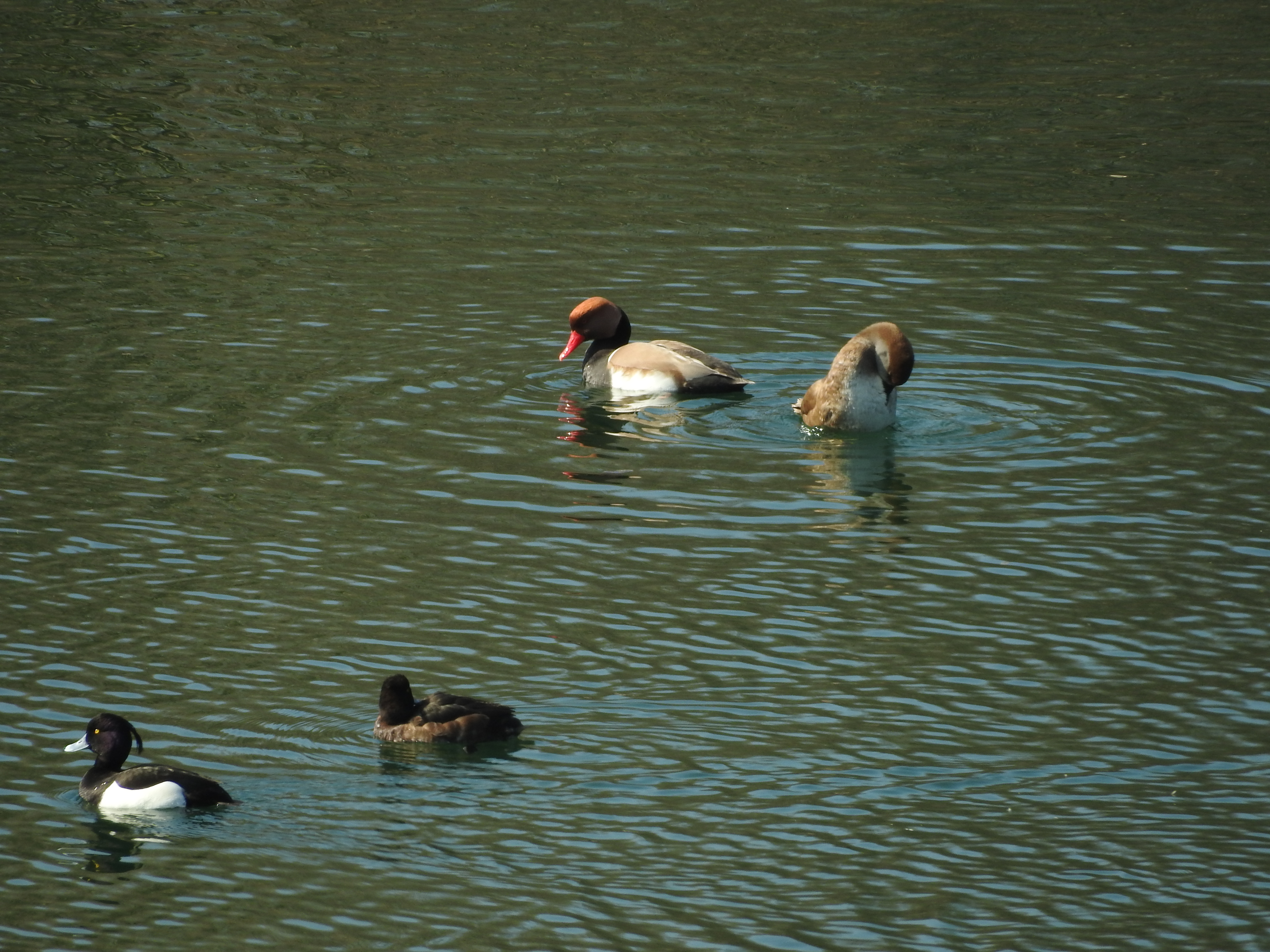 Kolbenente, NSG Erlich, 18.3.2016